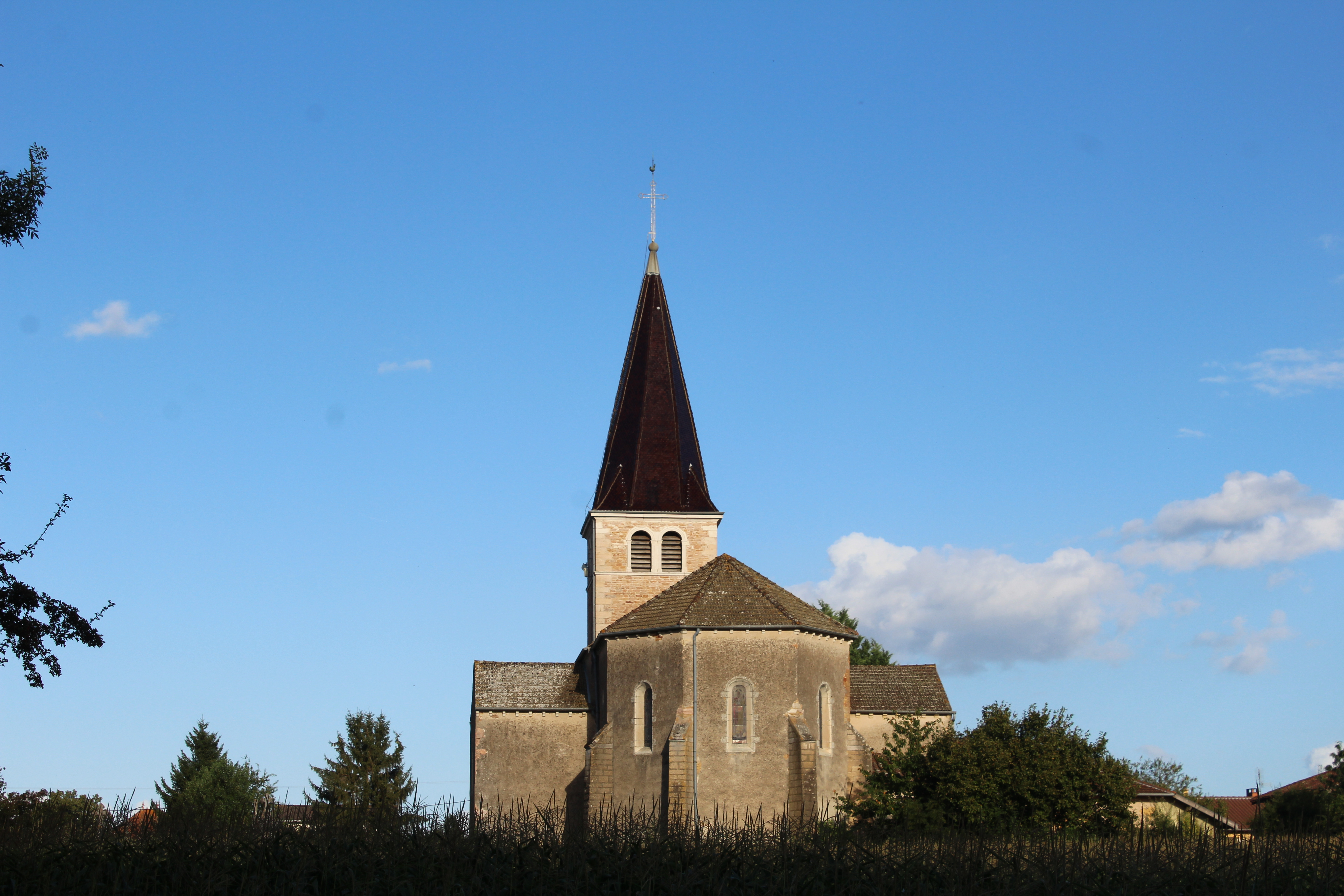 Église de Dommartin dans l'Ain.